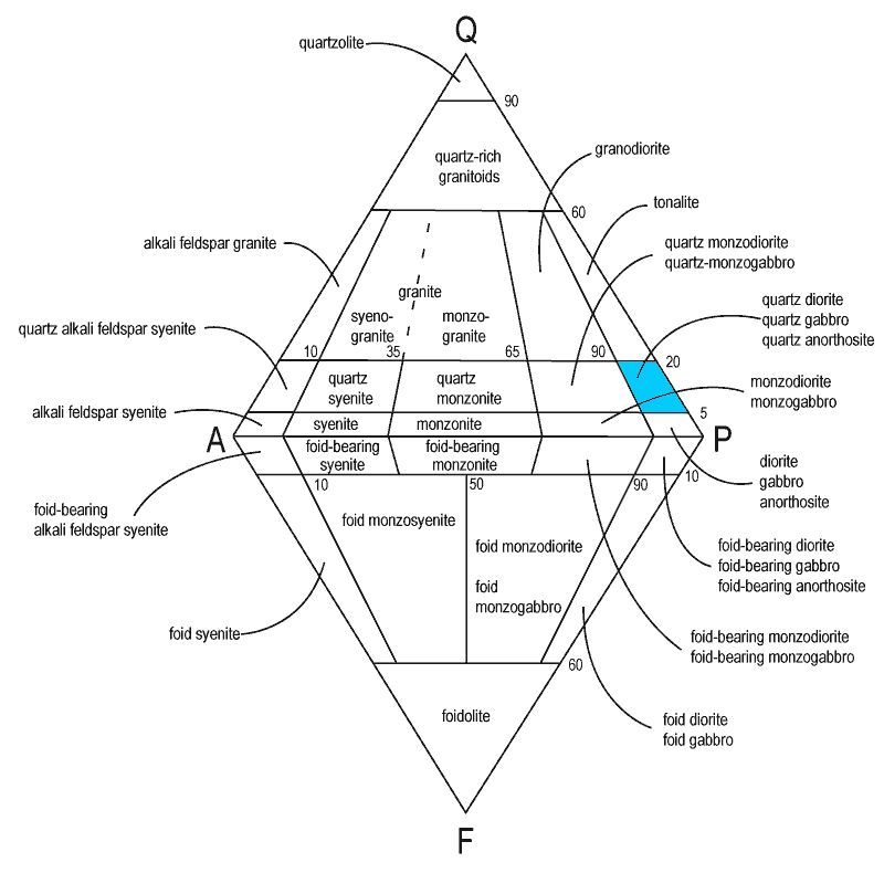 Quartz diorite in QAPF diagram